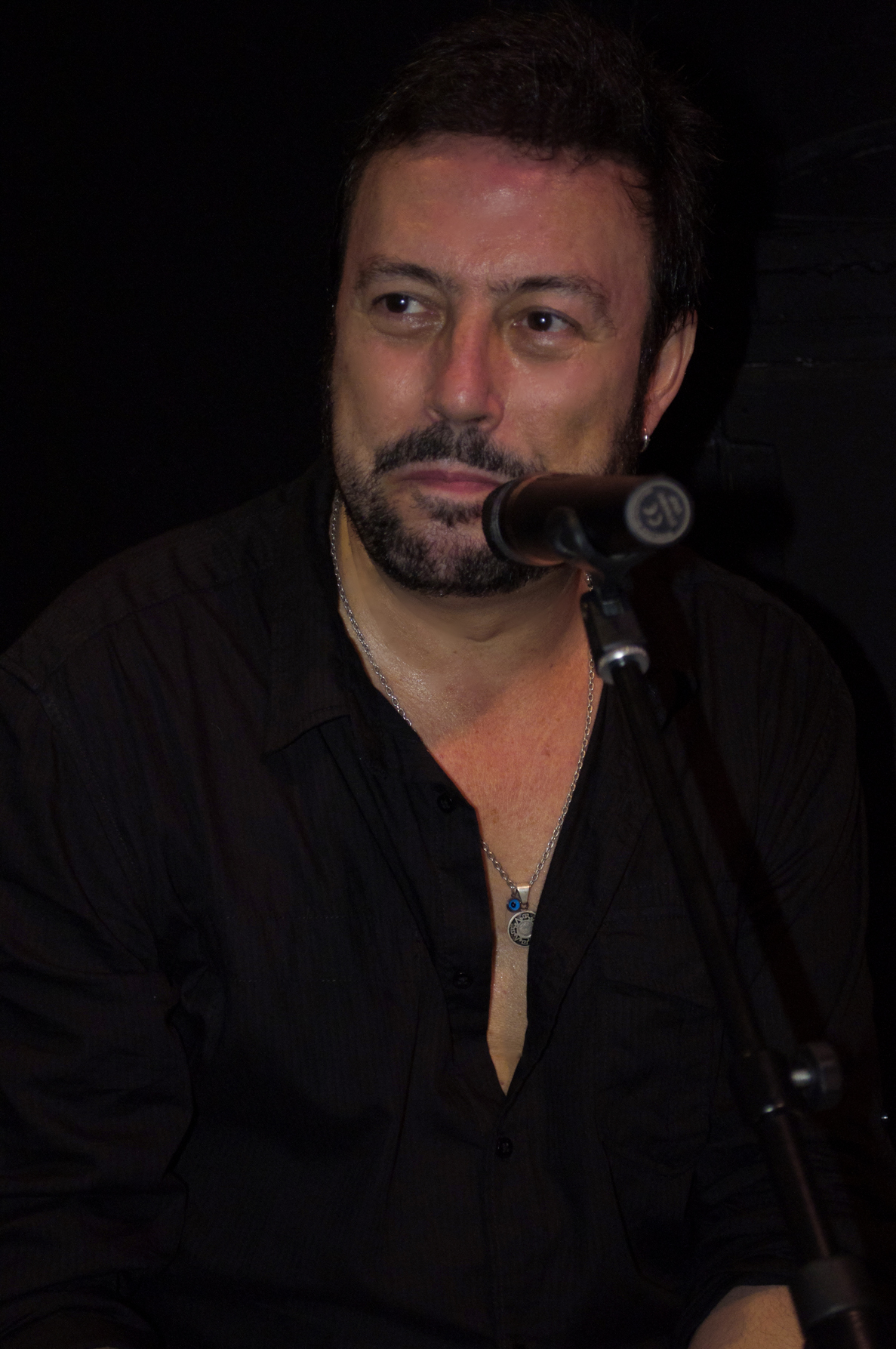 Ángel Petisme (foto Aitziber Cortijo)